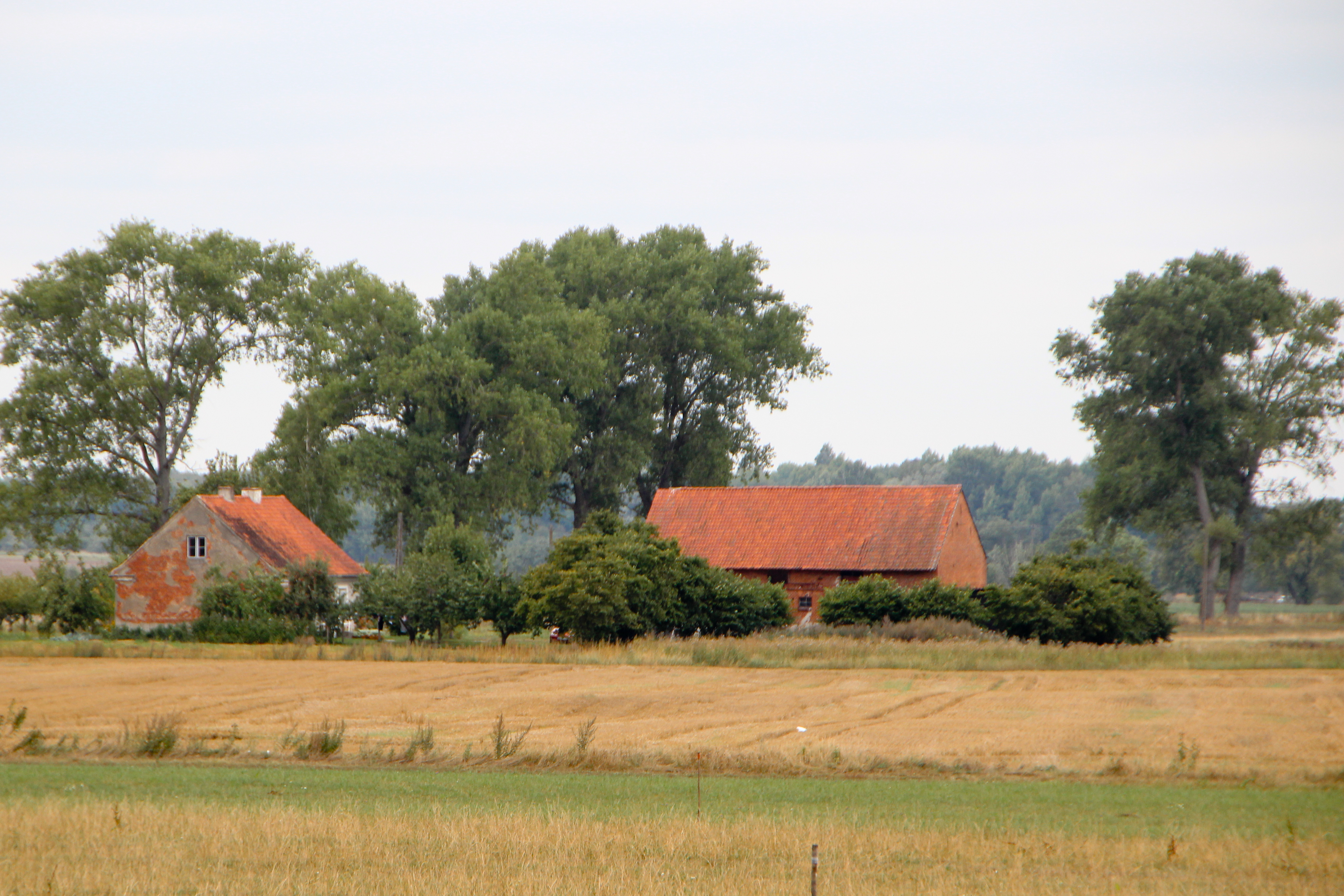 Duje - wieś w Polsce w województwie warmińsko-mazurskim, w powiecie kętrzyńskim, w gminie Barciany.